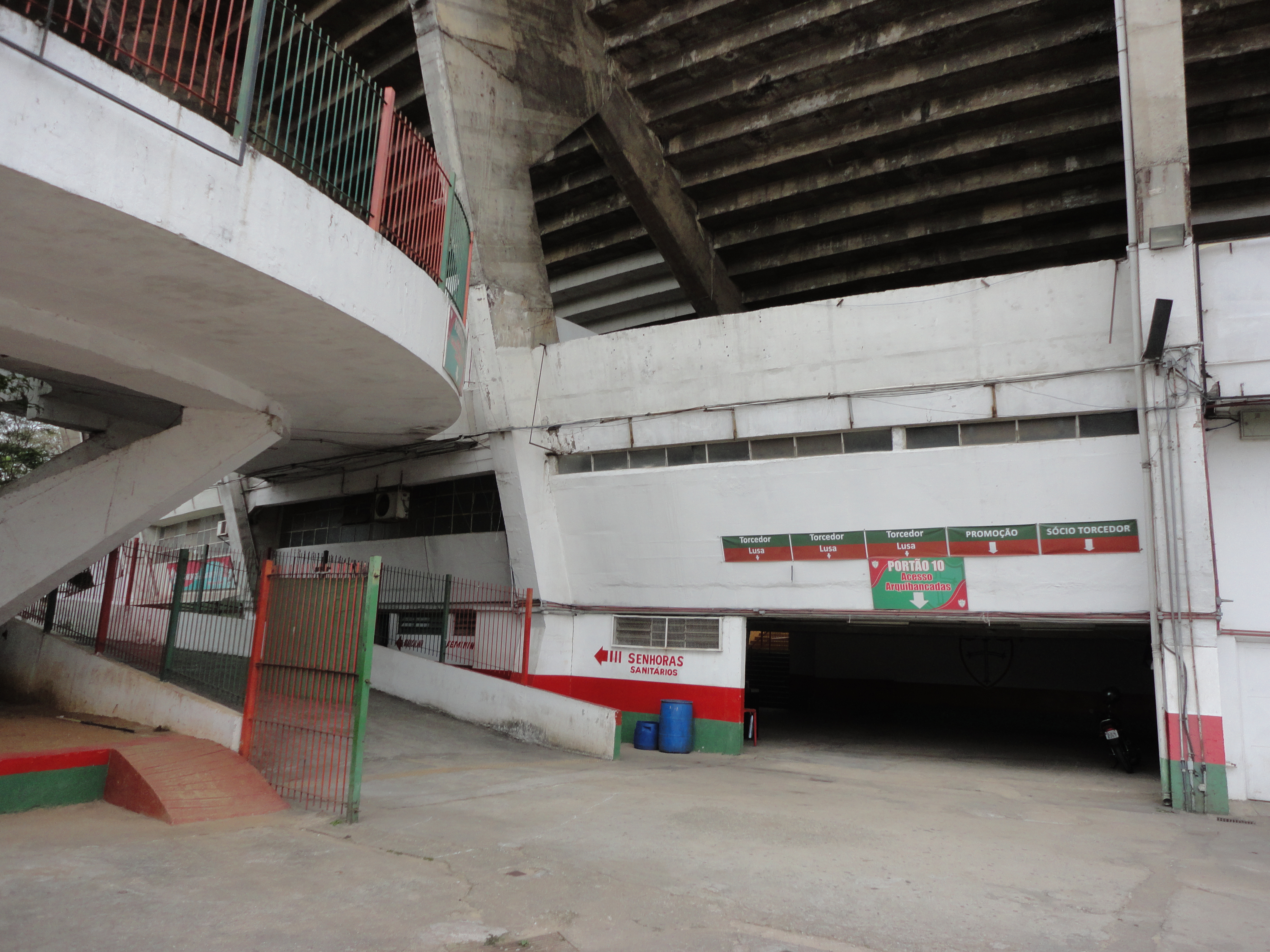 Entrada dos torcedores no Canindé, em São Paulo, Brasil